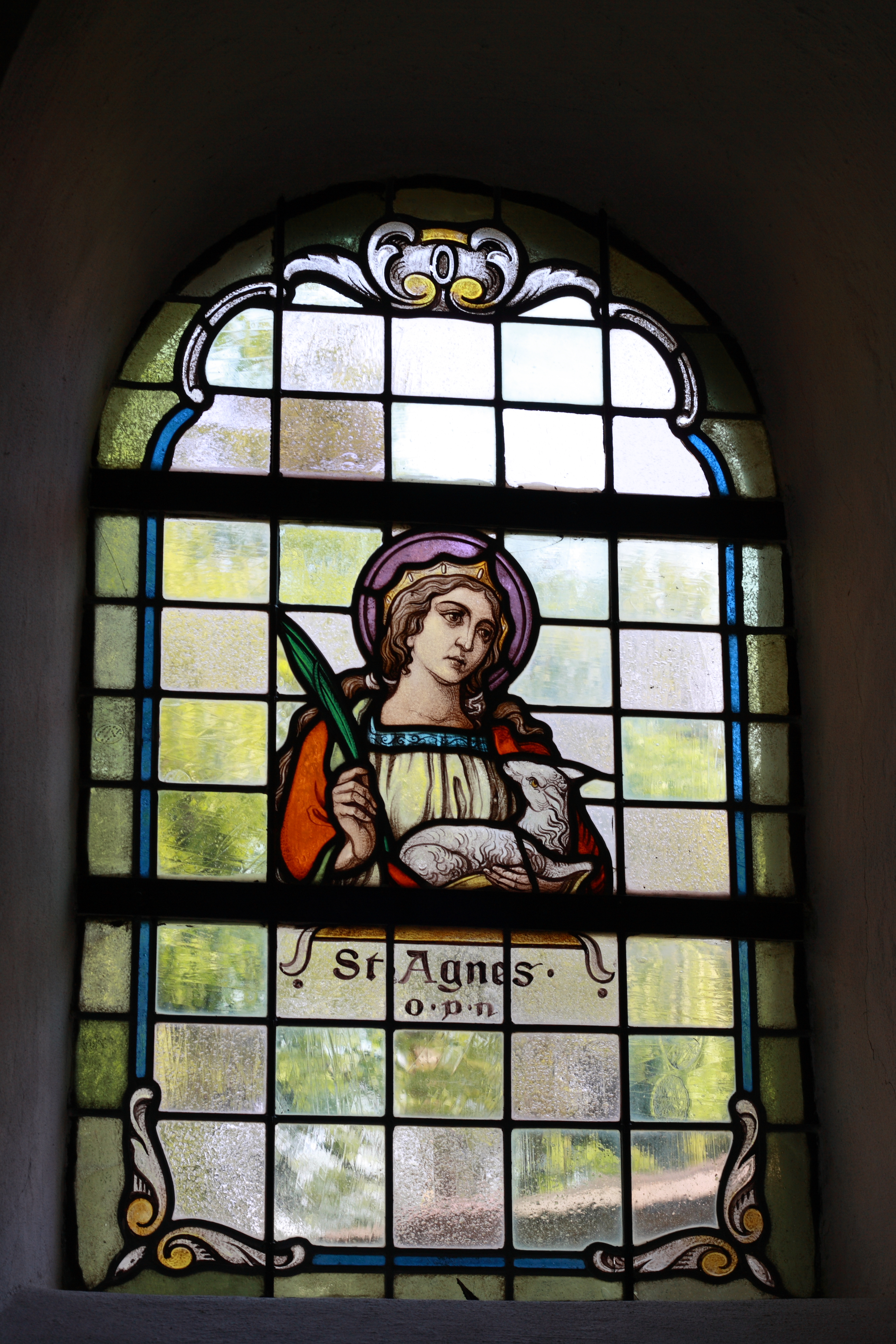 Bleiglasfenster in der katholischen Filialkirche St. Matthias in Köttelbach, einem Ortsteil von Kelberg, Darstellung: hl. Agnes, Herstellung: Glasmalerei H. Maier (Bad Neuenahr), um 1920